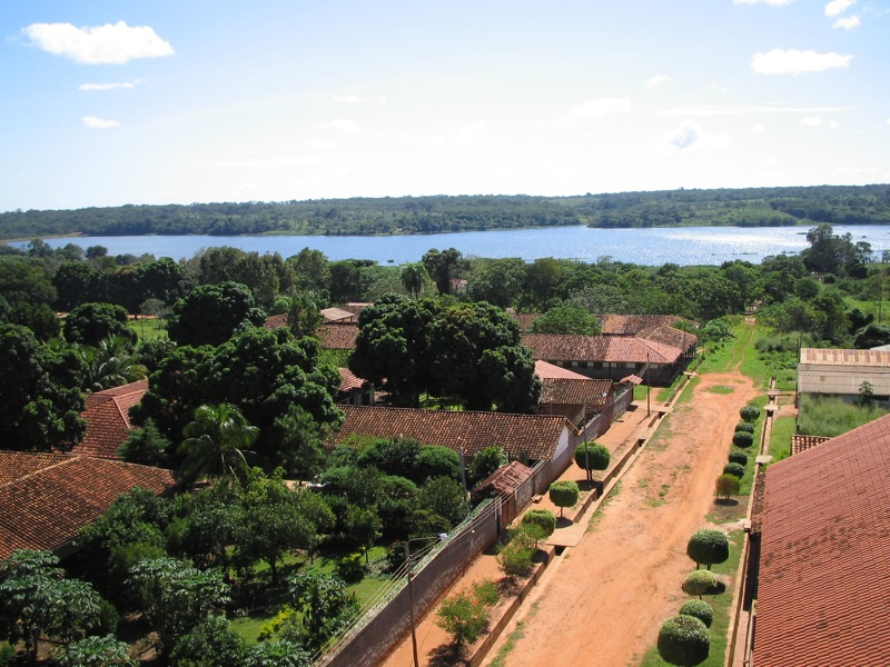 San Ignacio und der Guapomó-See. Runa Simi: San Ignacio de Velasco Wapumu quchawan, Santa Krus suyu, Buliwya.